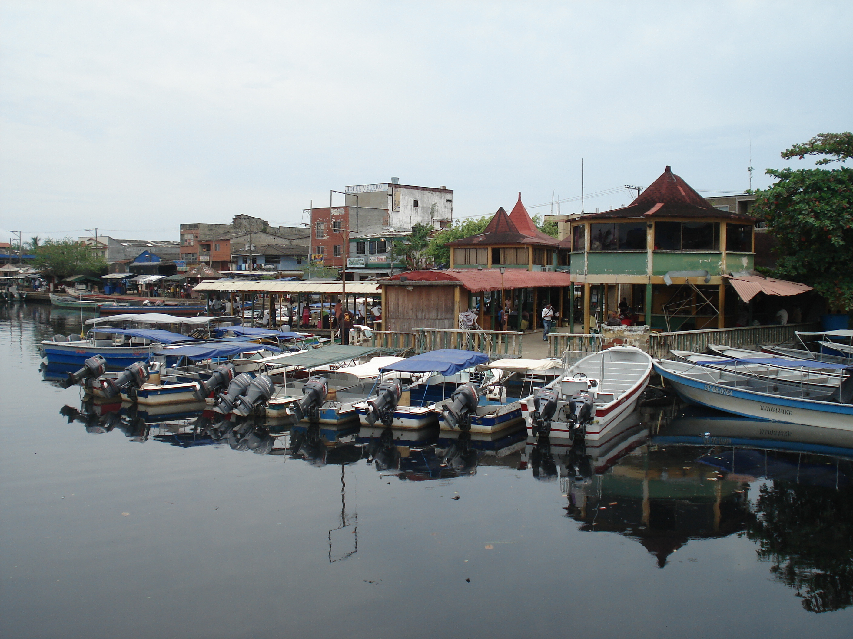 Puerto de Turbo